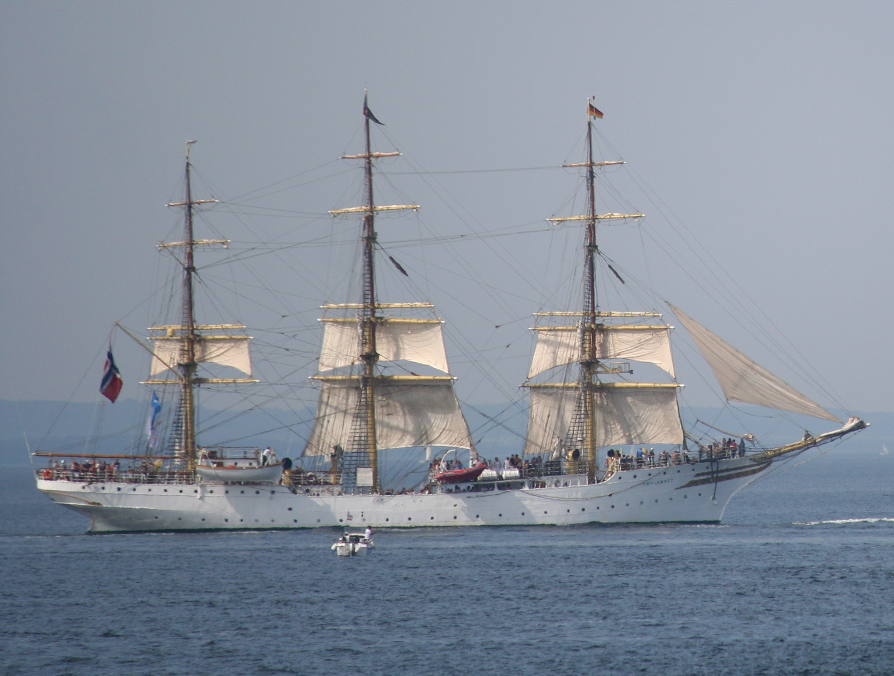 Das Segelschiff ‚Sørlandet‘ bei der Hanse Sail 2009 in Rostock